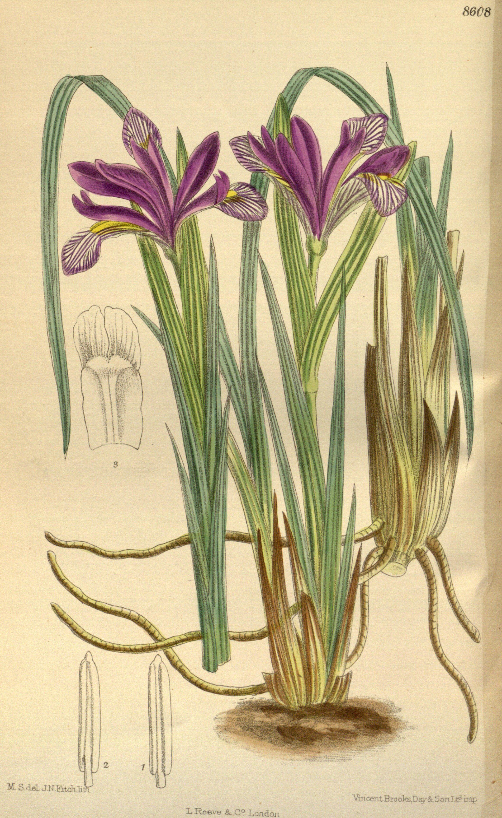 Iris urumovii (= Iris sintenisii subsp. sintenisii), Iridaceae